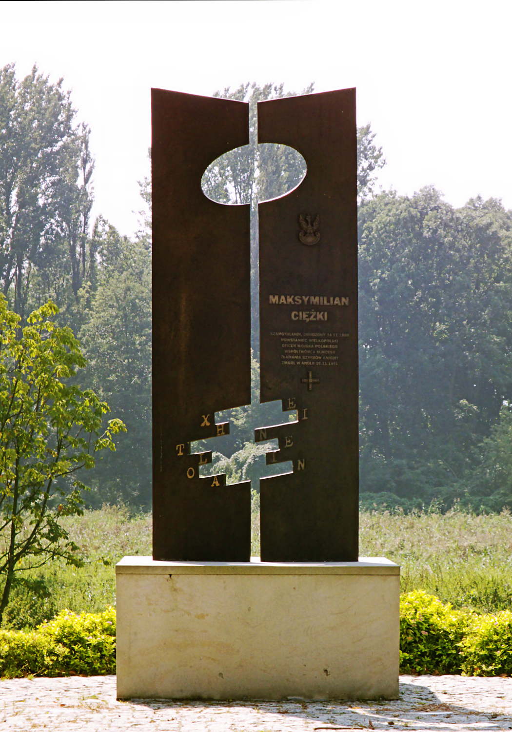 Szamotuły, Pomnik Maksymiliana Ciężkiego przy ul. Dworcowej